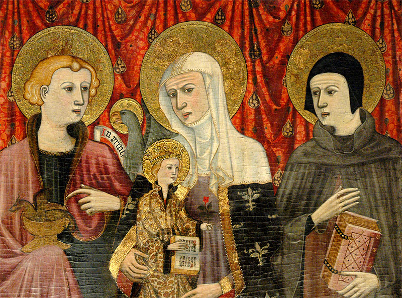 Detall del compartiment principal del Retaule de Santa Anna, la Mare de Déu i sant Amador. Església de Sant Miquel de Cardona. Cardona, Bages (Catalunya, Espanya)